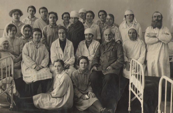 Профессор А.И. Писнячевский с сотрудниками клиники нервных и душевных болезней и её пациентами, 1930 год.